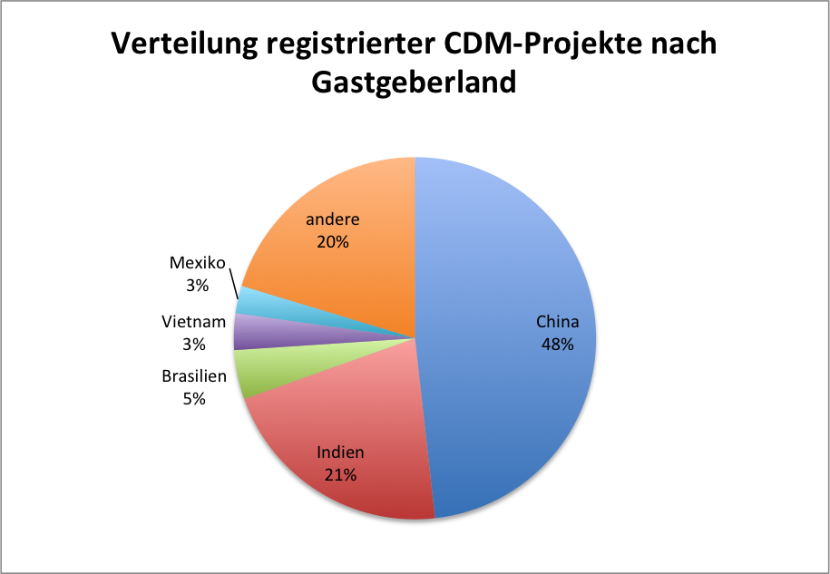 Verteilung registrierter CDM Projekte nach Gastgeberland (Tortendiagramm)